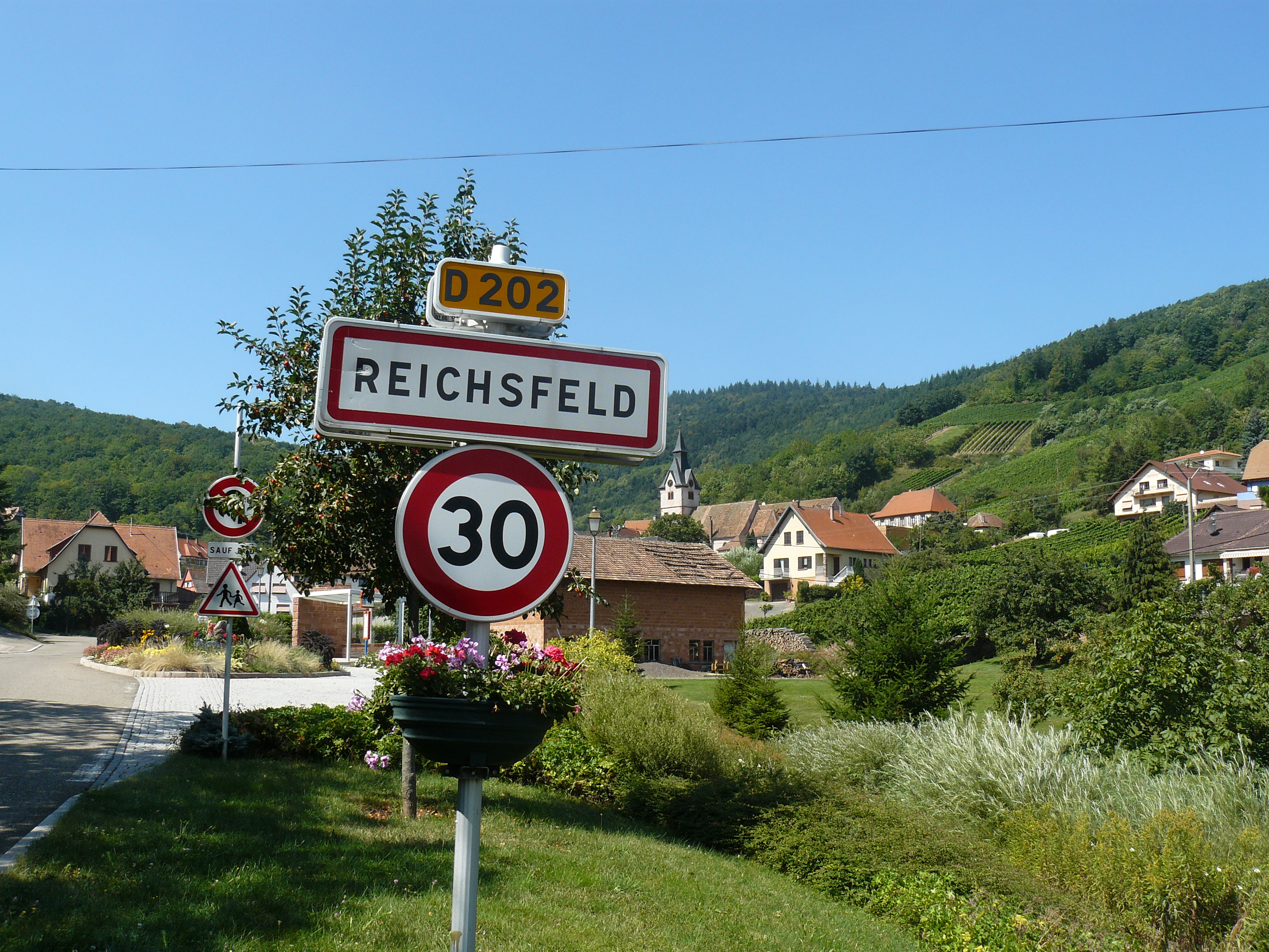 Entrée du village de Reichsfeld en venant de Bernardvillé